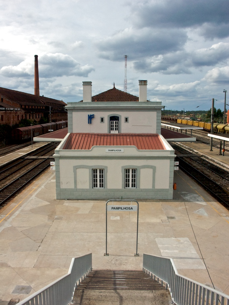 Tipo: E Estação Local: Pampilhosa Linha do Norte, PK 231 • Linha da Beira Alta, PK 50 Data e hora: 3 de Setembro de 2008 16h21